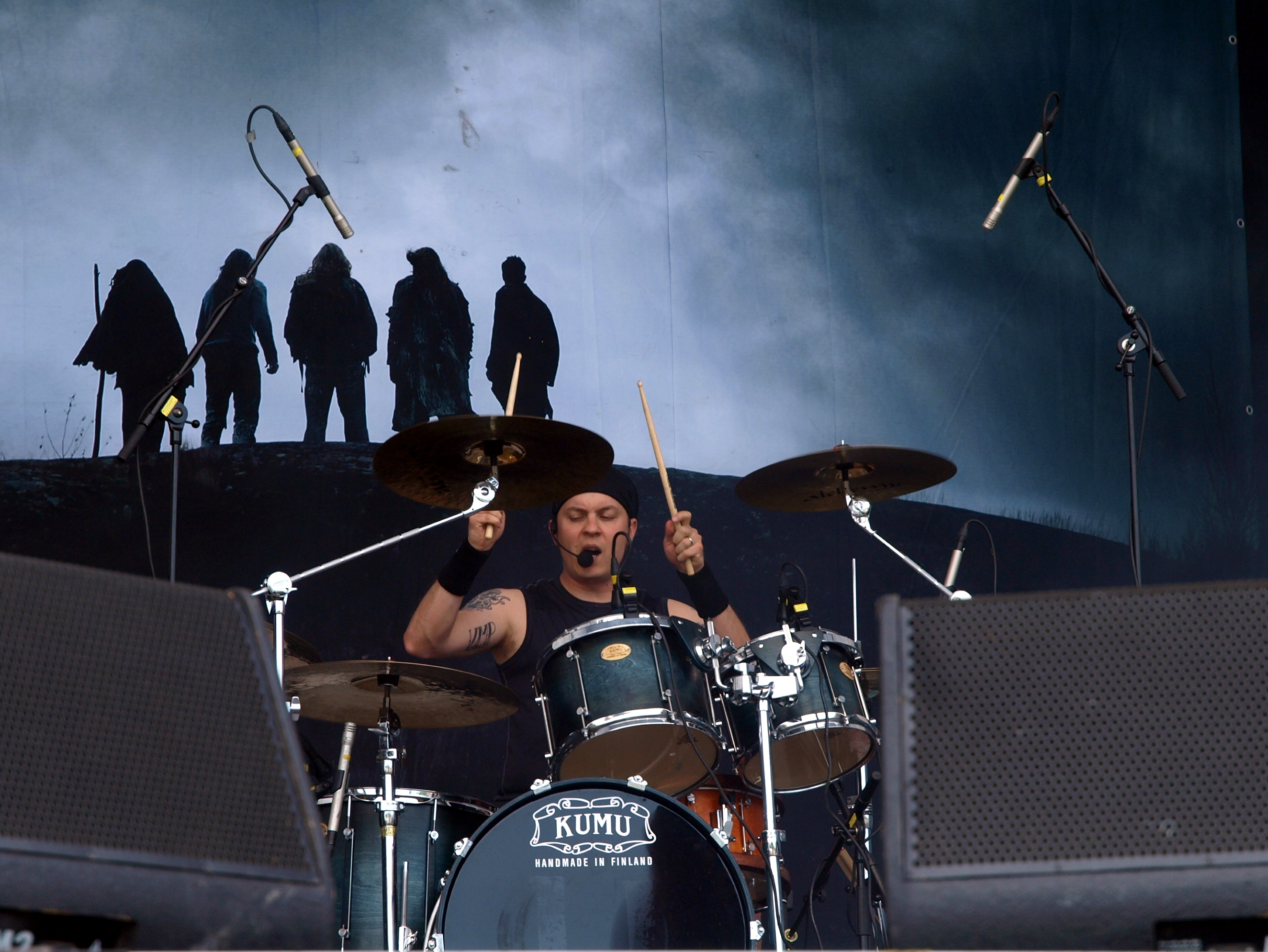 Moonsorrow live am Myötätuulirock 2011